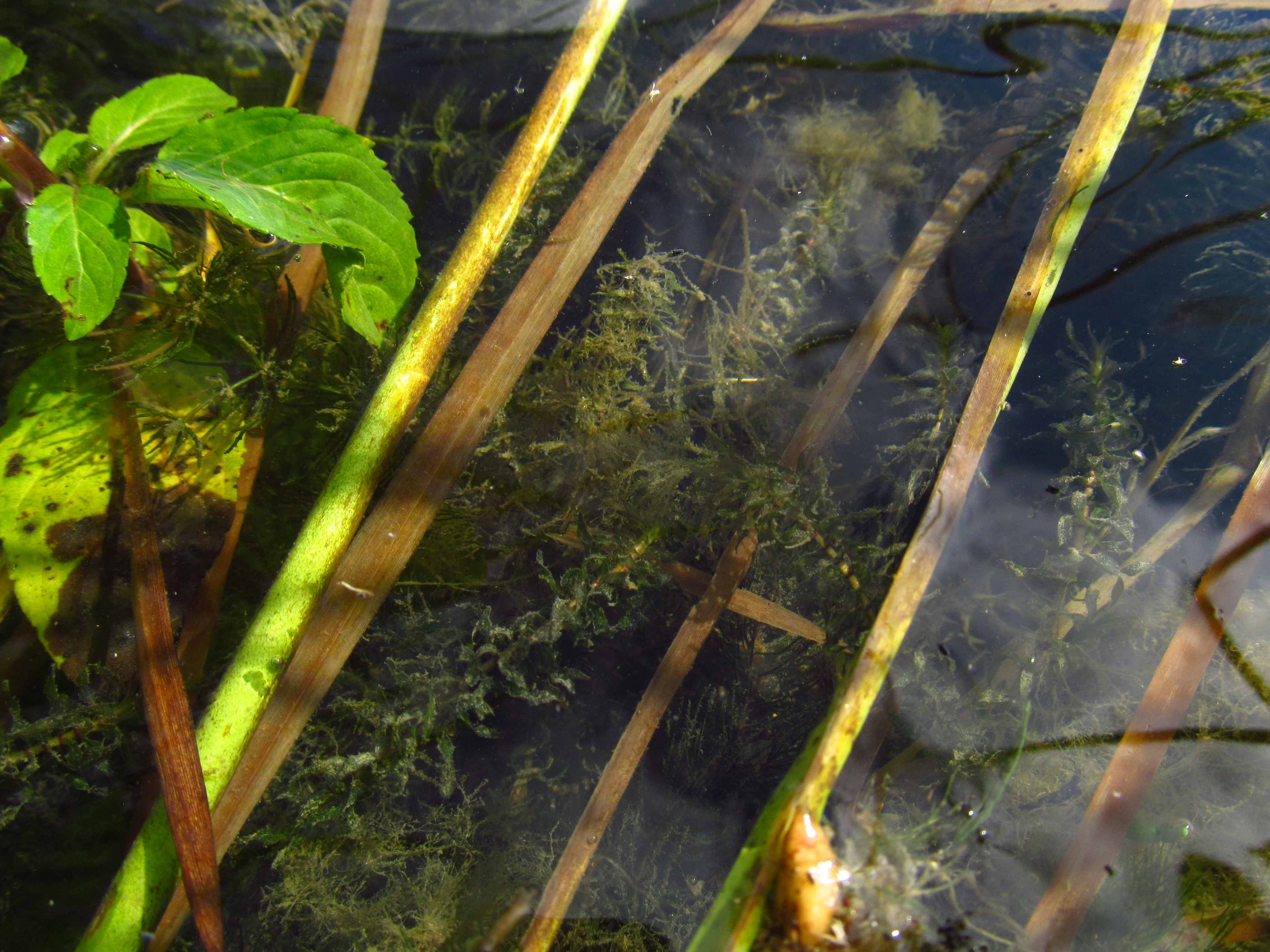 Srpski (latinica): vodena kuga (Elodea nuttallii)